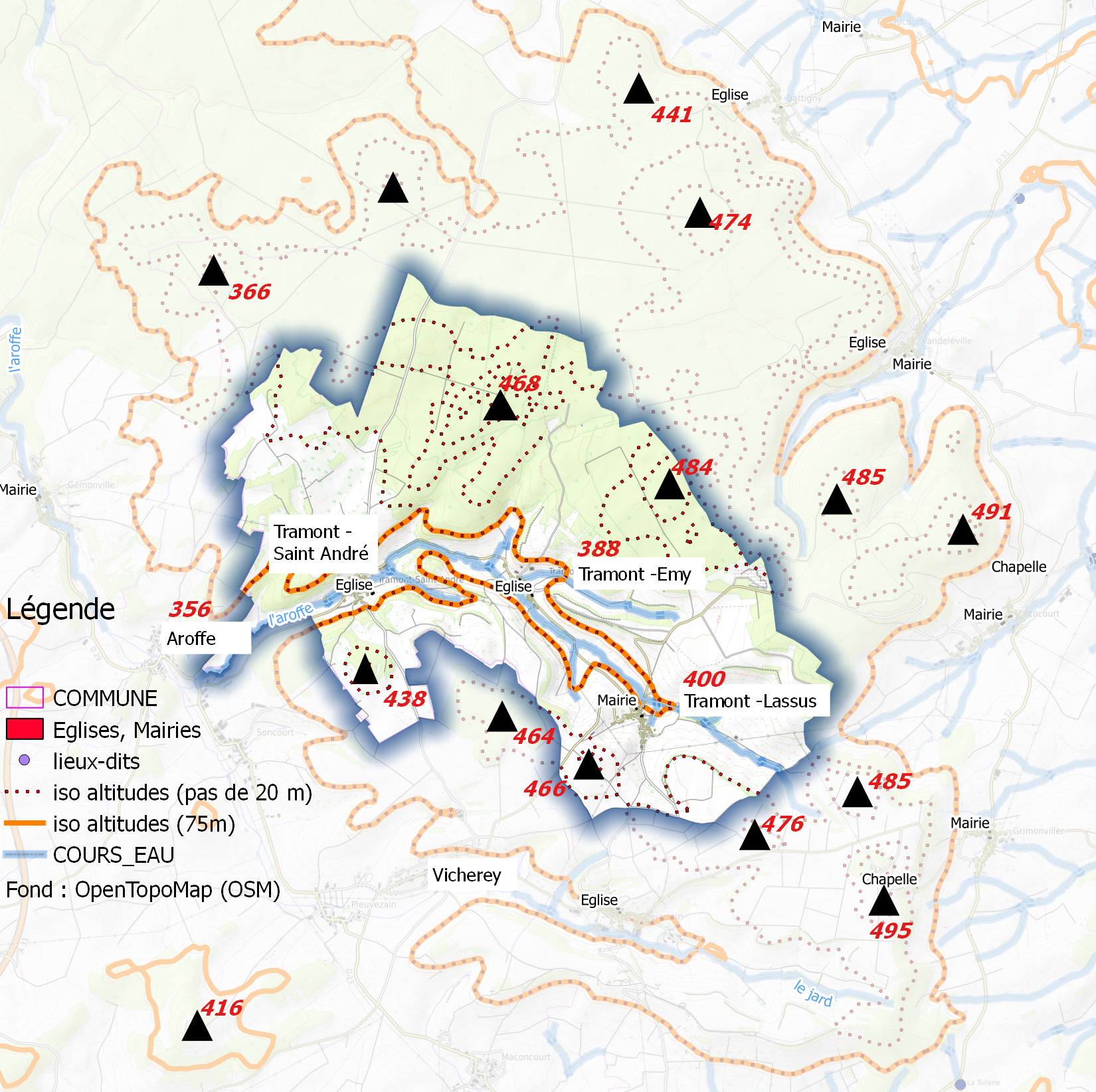 Tramont (la vallée de l'Aroffe dans son relief), OSM topo Map et Qgis